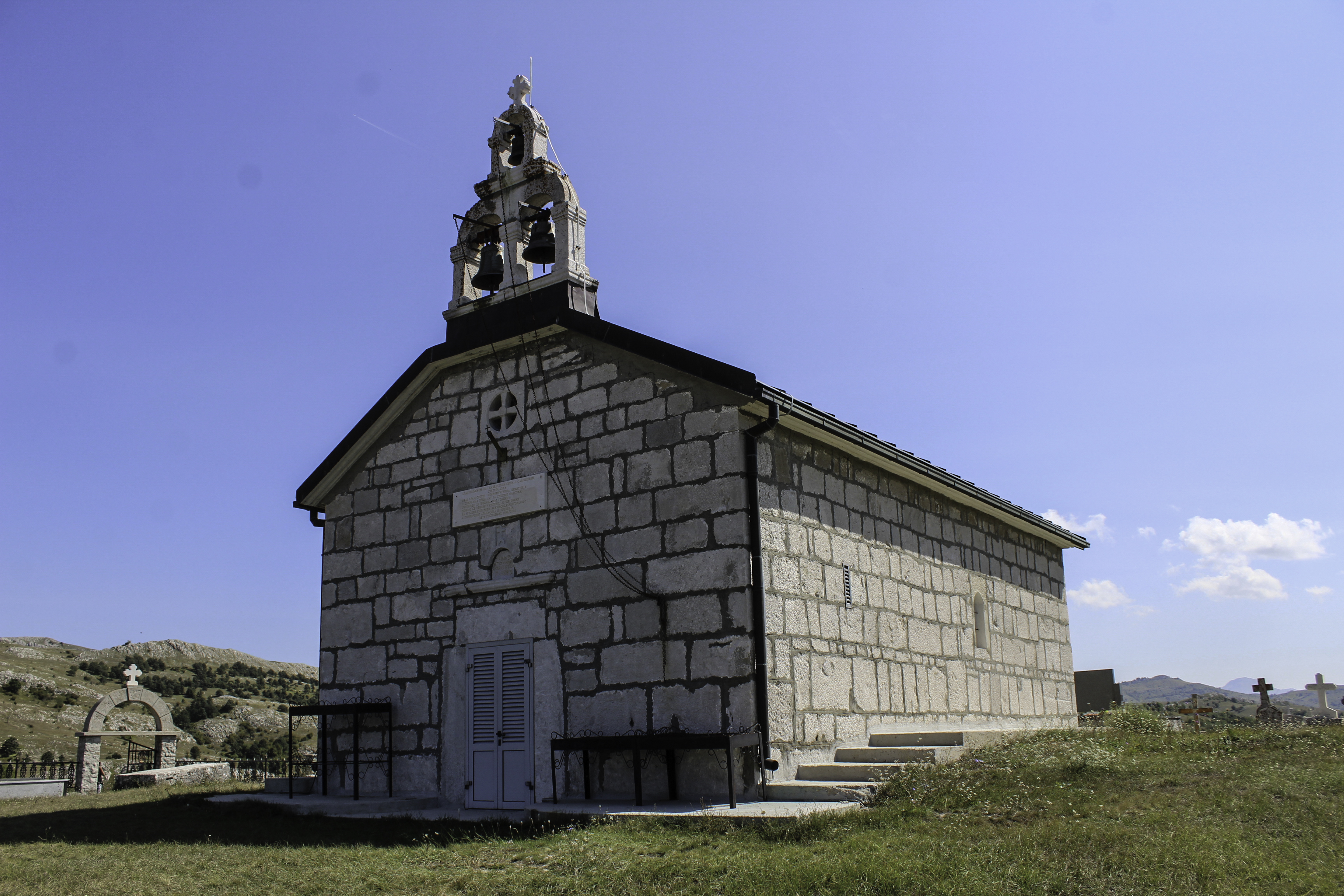 This image was uploaded as part of Trace of Soul 2018. Црква Светог Димитрија - Домрке (Гацко).